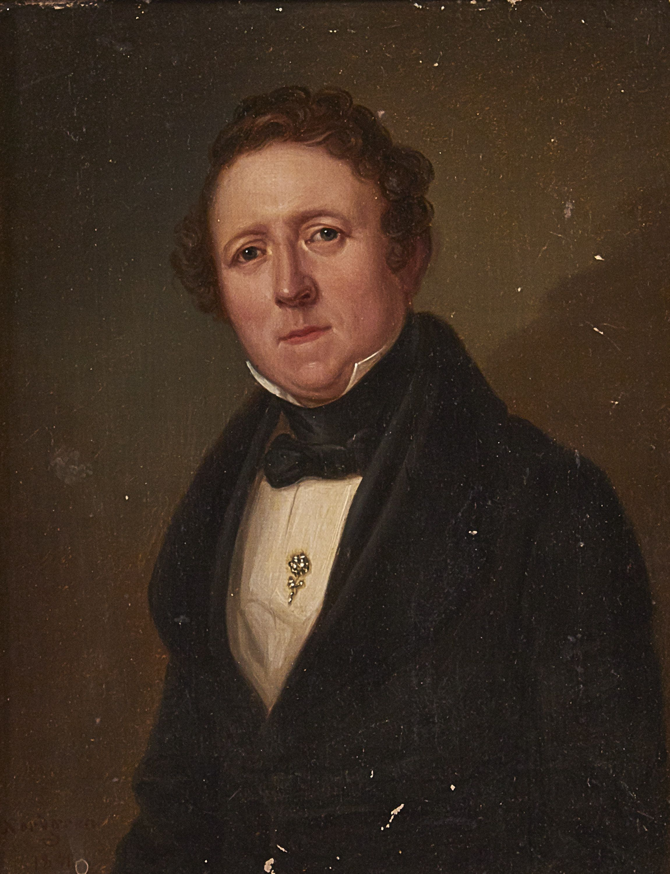 Porträtt av juveleraren Carl Fredrik Hultbom, avporträtterad 1841 av Carl Wilhelm Nordgren.